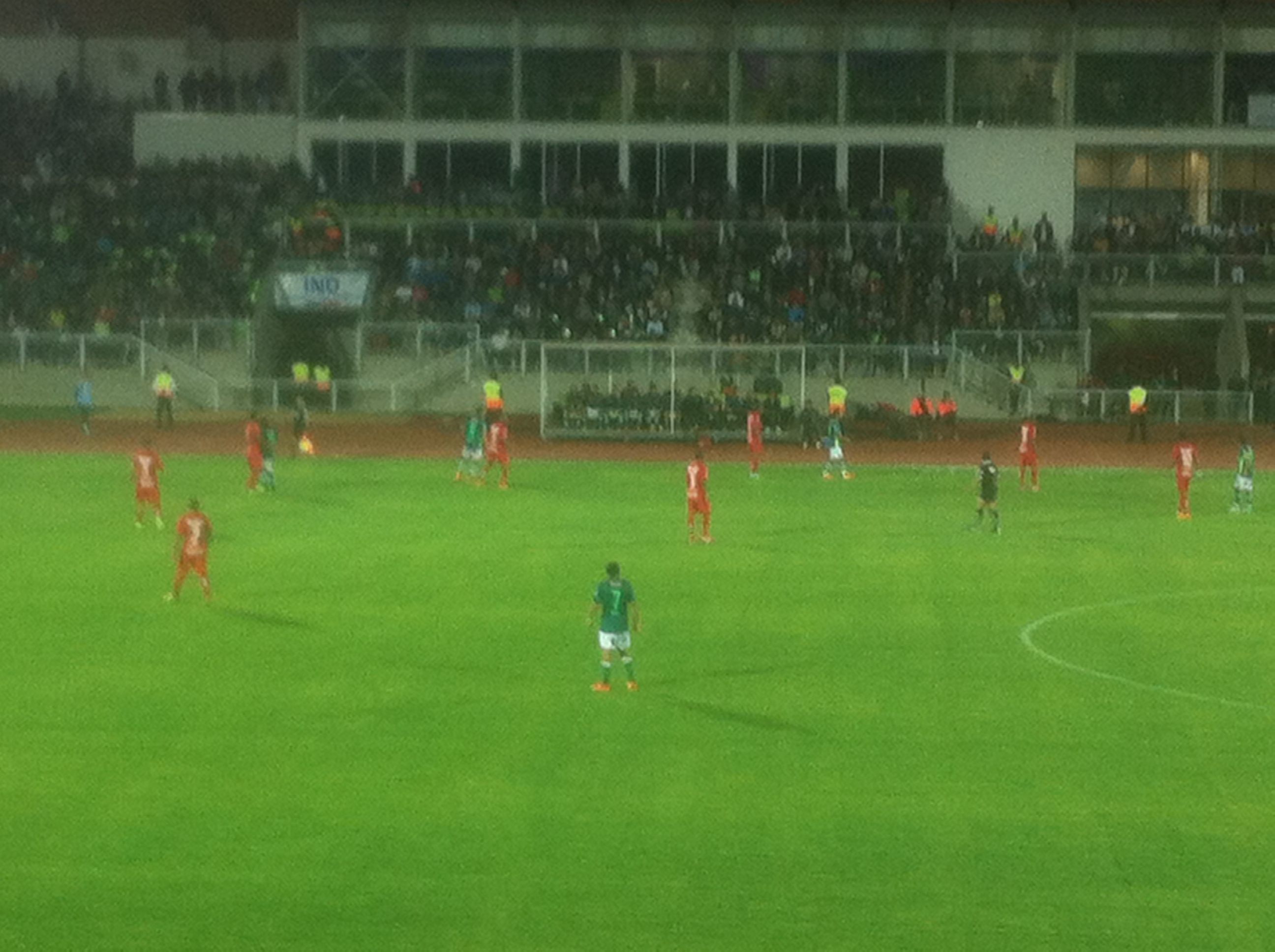 Fotografía de un partido de fútbol entre Santiago Wanderers de Chile, contra Internacional de Brasil.